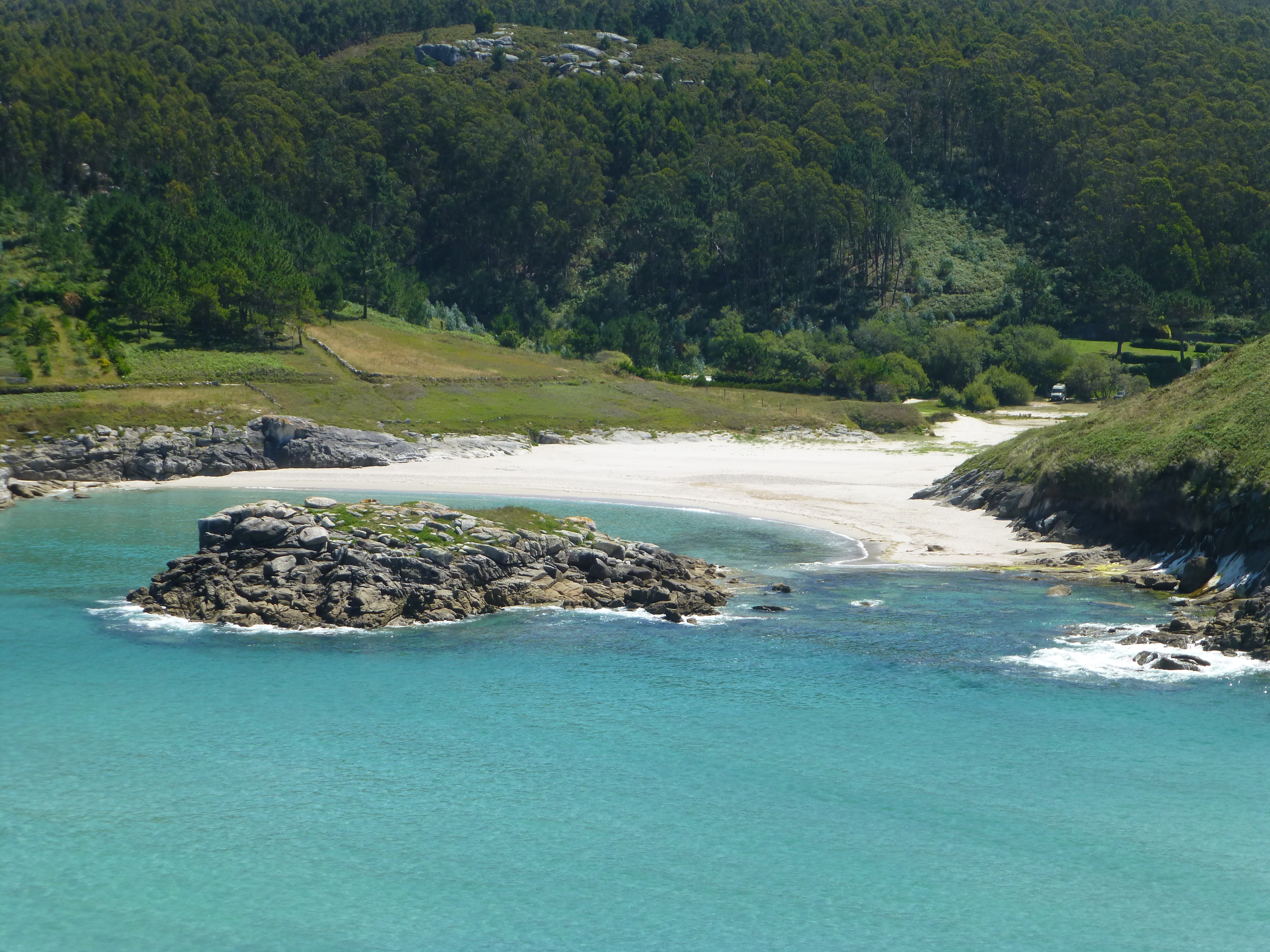 Playa de Niñóns, Ponteceso, A Coruña, Galicia, España.